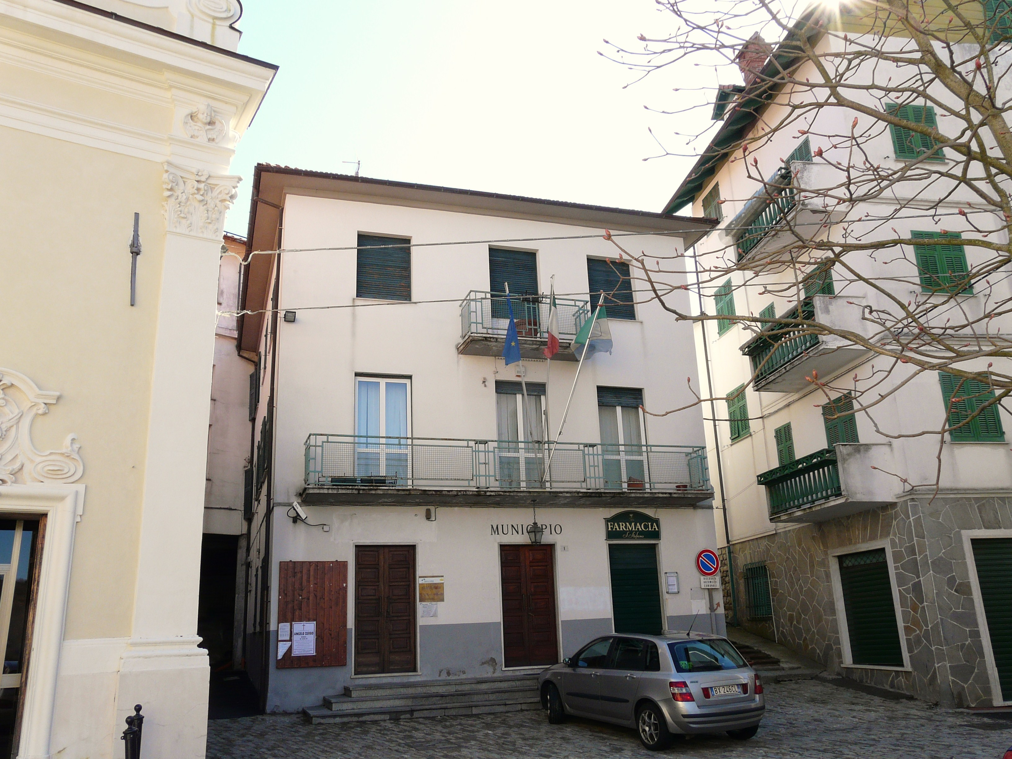 Municipio di Fontanigorda, Liguria, Italia